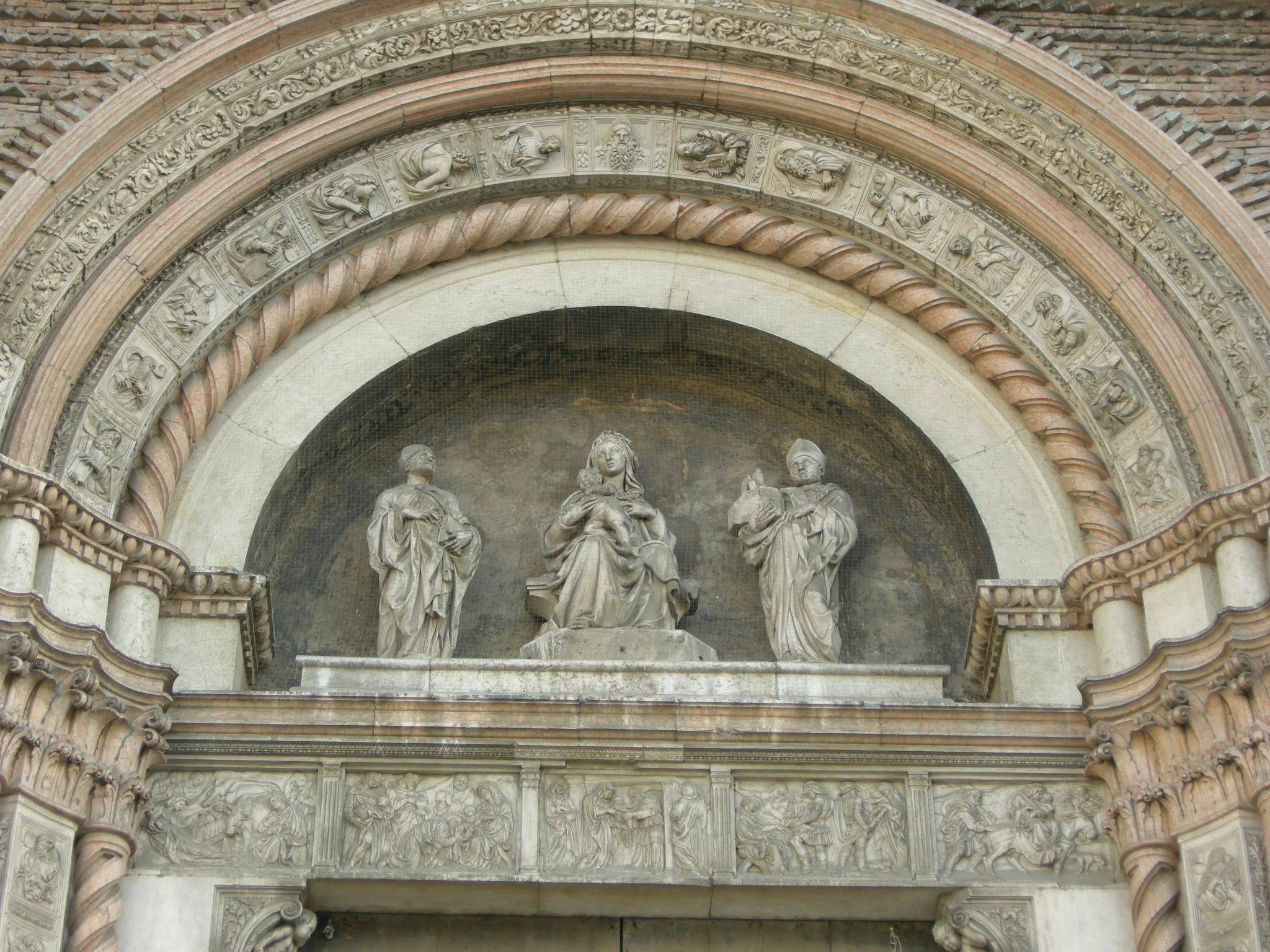 San petronio, portale maggiore 04 lunetta e architrave con scene del nuovo testamento di jacopo della quercia